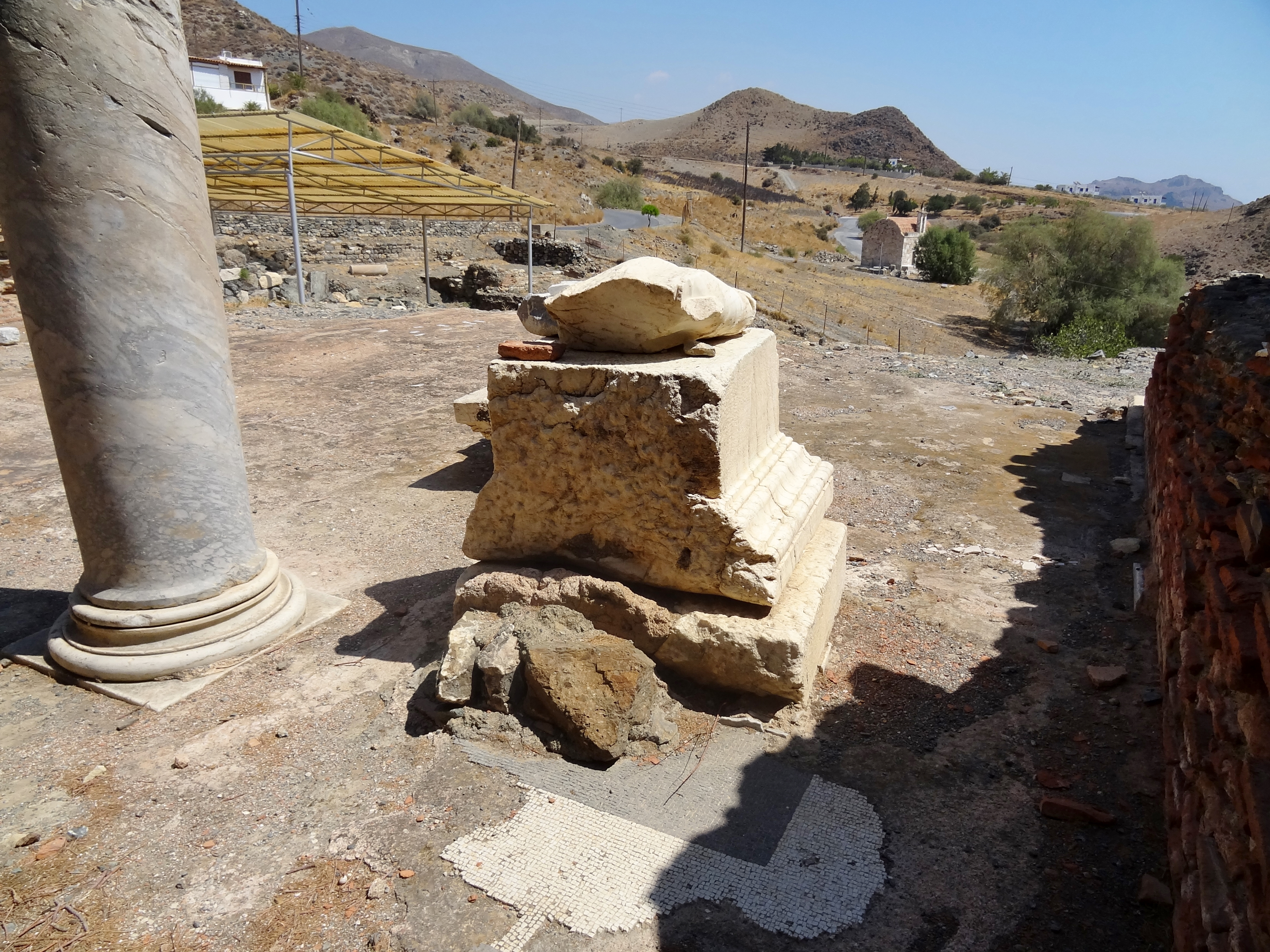 Asklepios-Heiligtum des antiken Leben (Λεβήν) in Lendas, Gemeinde Gortyna, Regionalbezirk Iraklio, Kreta, Griechenland